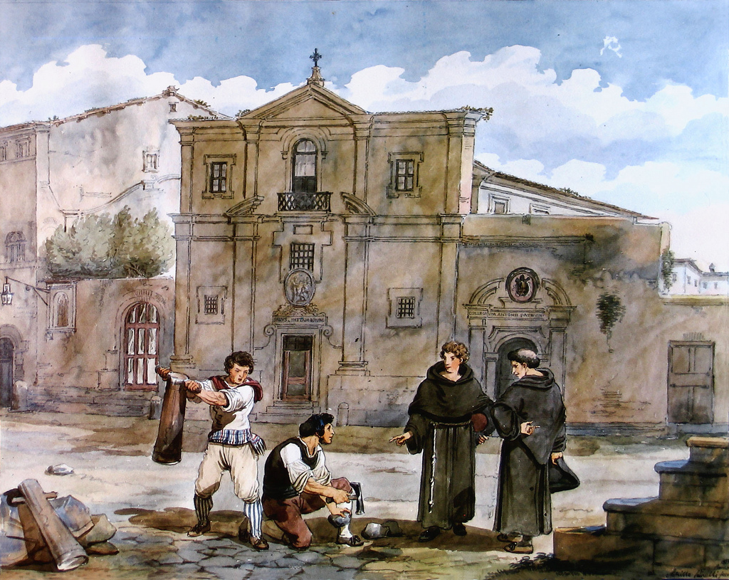 Santa Maria della Sanità by Achille Pinelli (1830s)